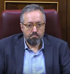 Juan Carlos Girauta, en septembre 2017.